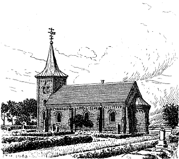 Tegning af Essenbæk Kirke fra fjerde bind af tredje udgave af Trap Danmark.